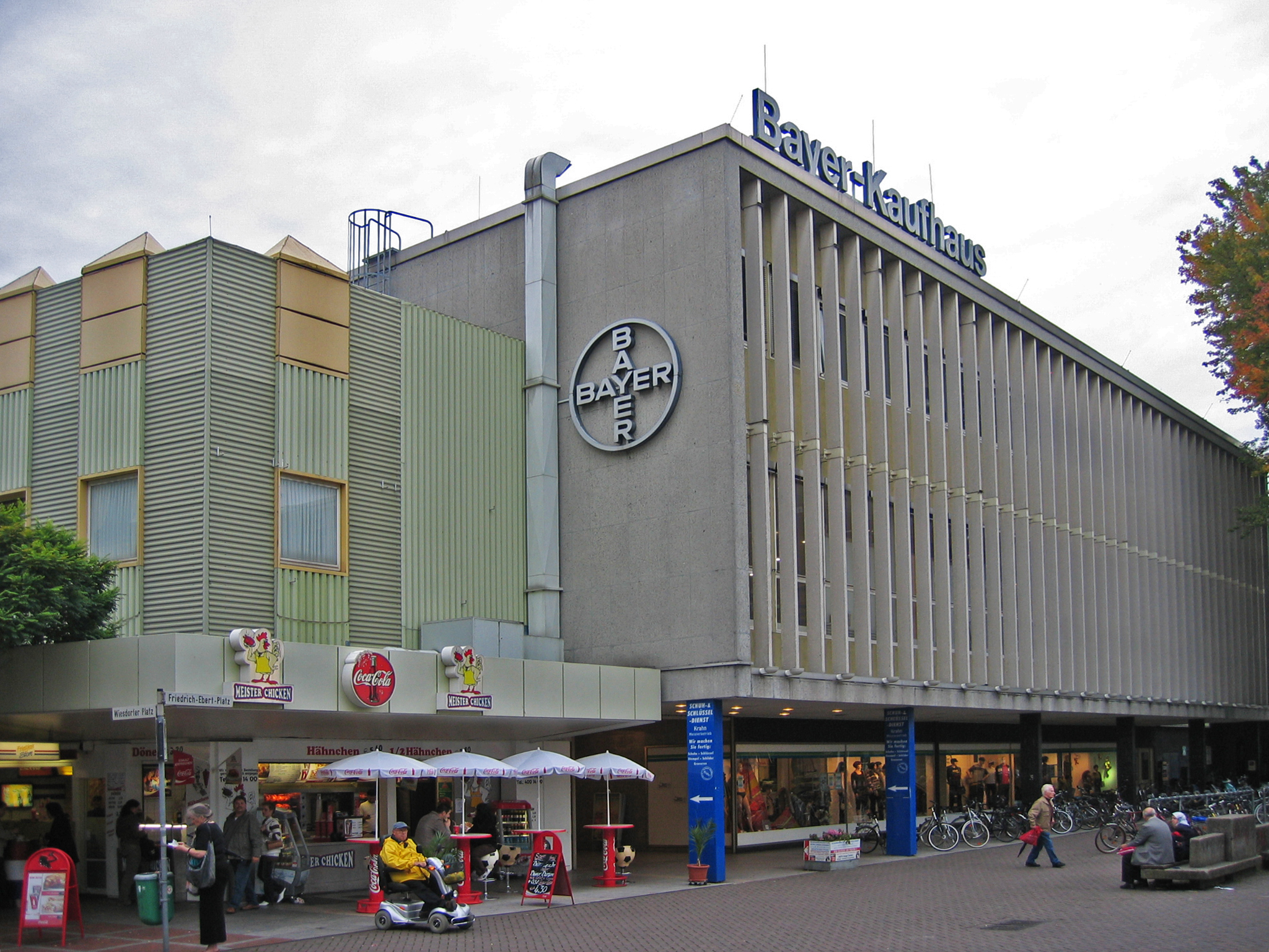 Bayer-Kaufhaus, Hauptfiliale in Leverkusen-Wiesdorf (nicht mehr existent)